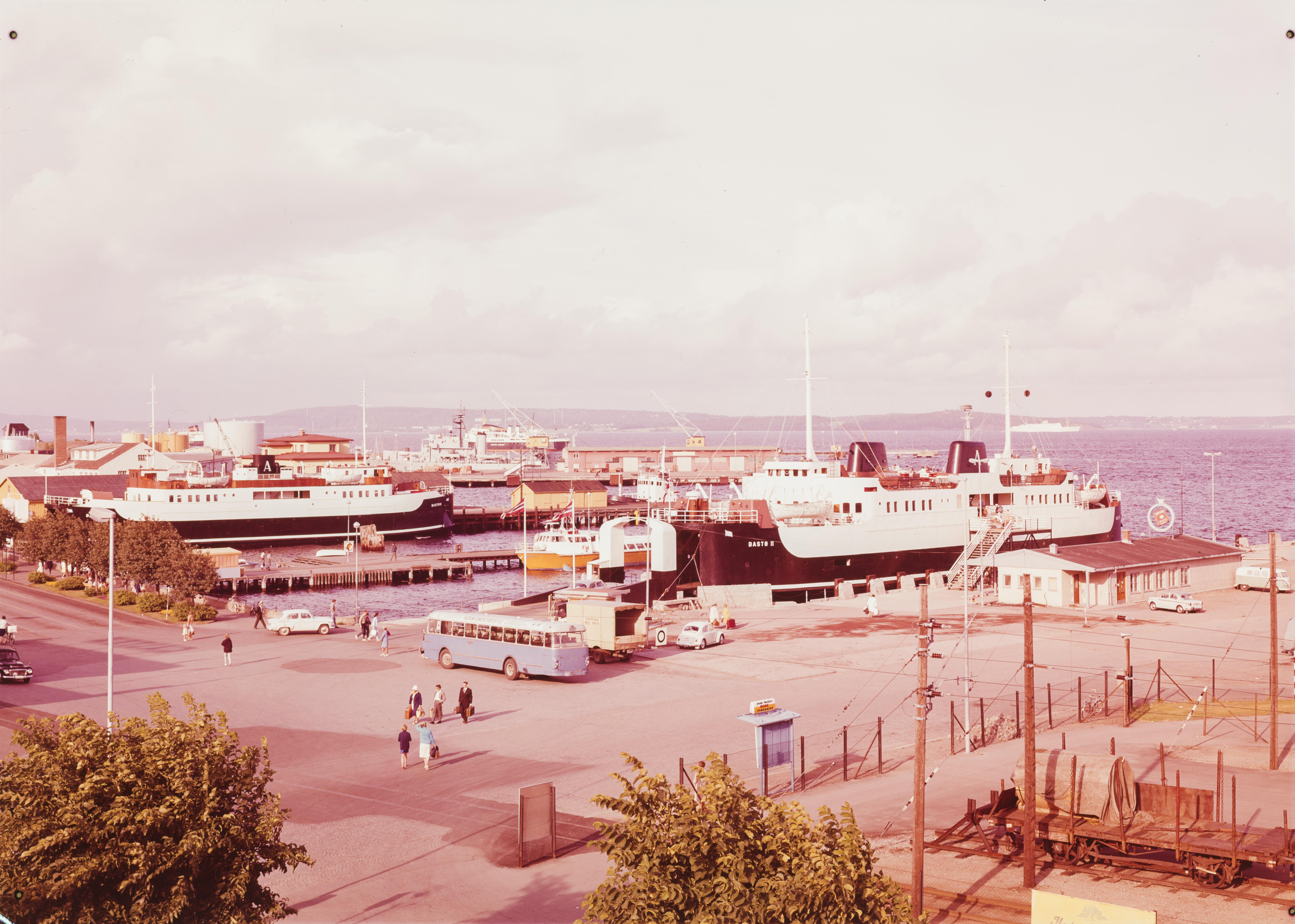 Bildet er hentet fra Nasjonalbibliotekets bildesamling. Anmerkninger til bildet var: Tittel er hentet fra emballasje. Horten, Horten, Vestfold